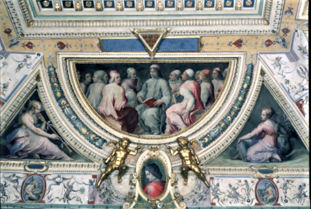 Francesco Accolti, 4. von rechts, mit den italienischen Humanisten, im Bogenfeld zwischen den beiden Allegorien Fama und Virtue